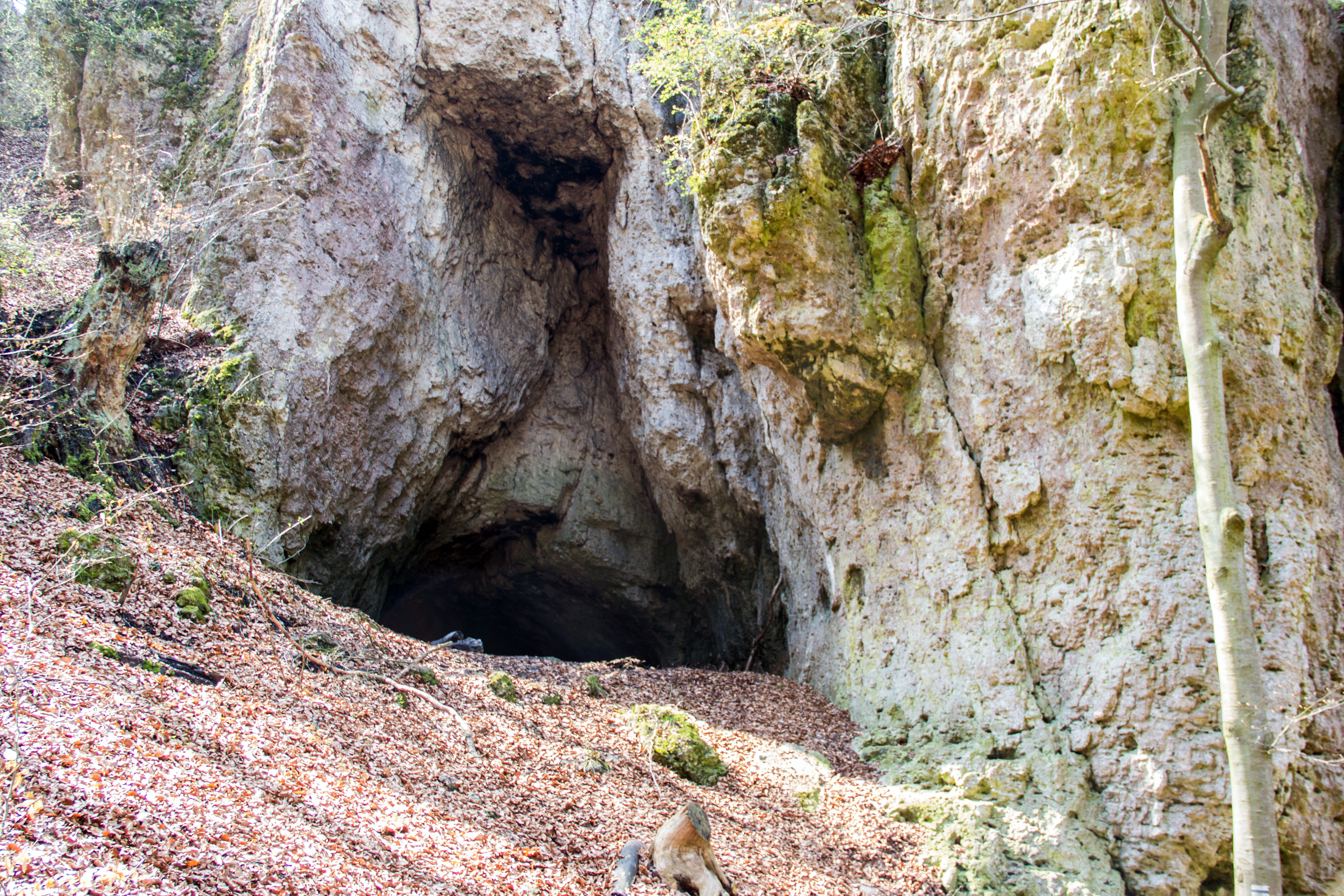 Kühloch bei Königstein